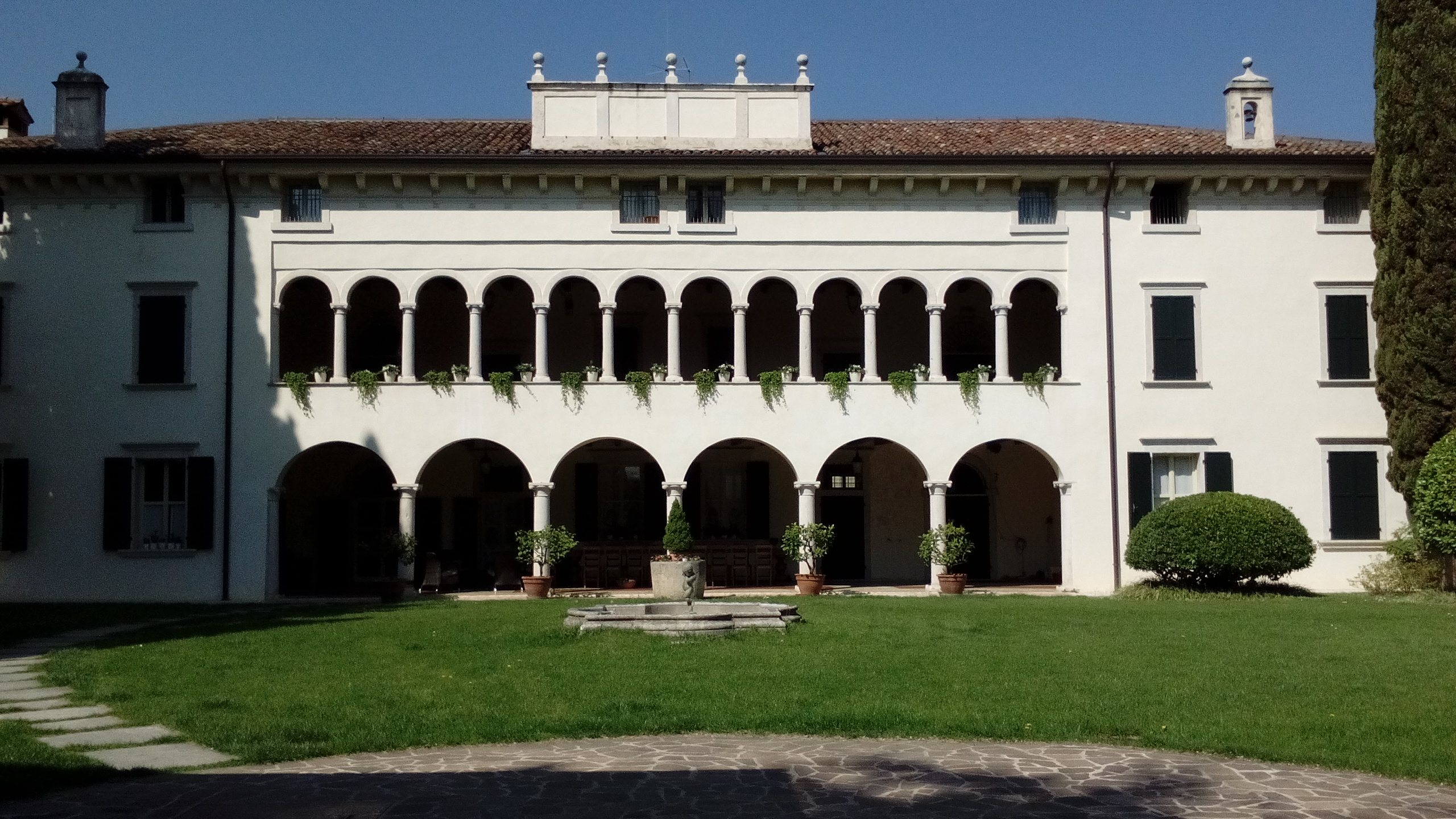 Facciata di Villa Selle a Fumane, provincia di Verona.